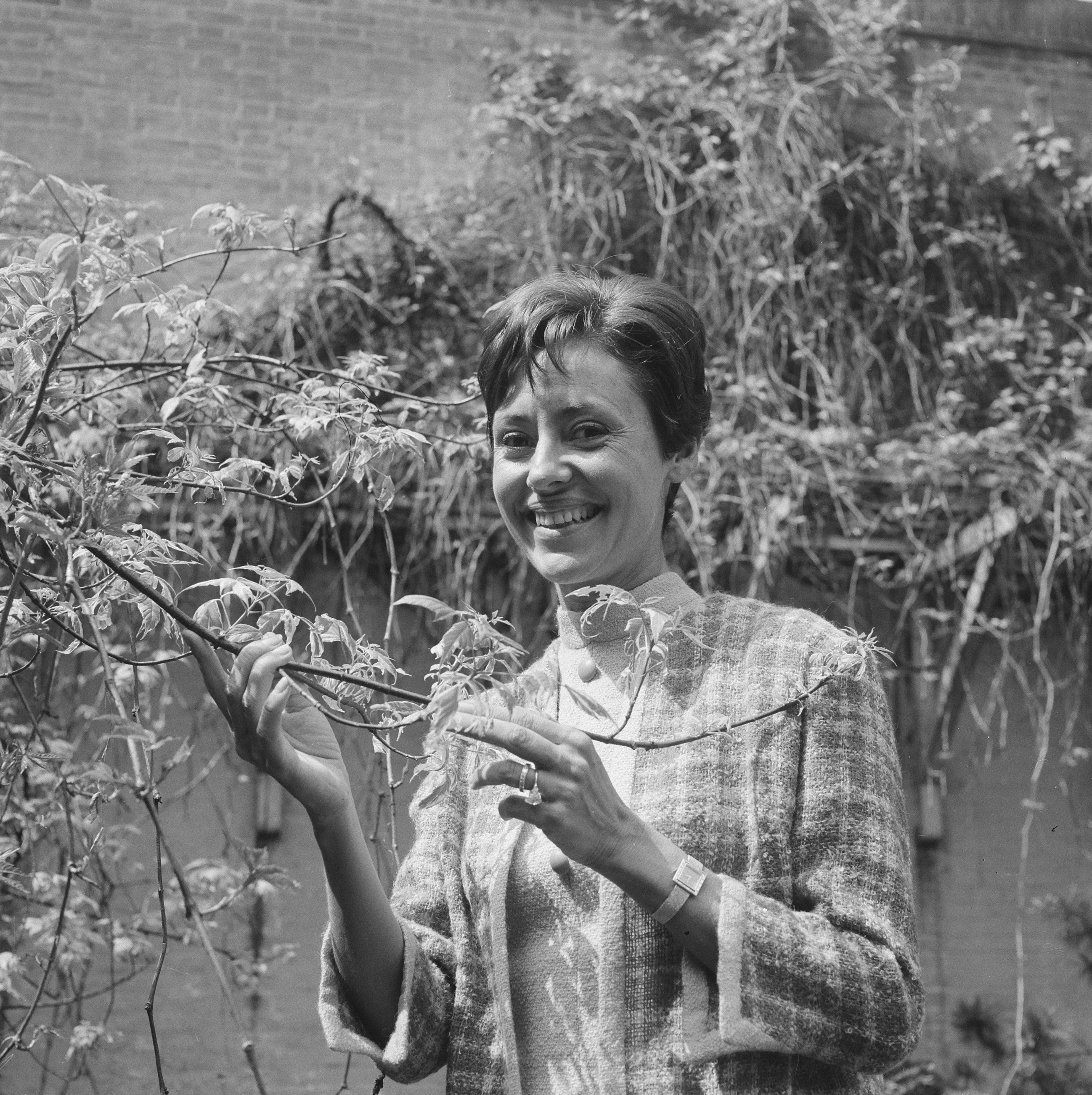 Collectie / Archief : Fotocollectie Anefo Reportage / Serie : [ onbekend ] Beschrijving : Caterina Valente Datum : 12 mei 1966 Persoonsnaam : Caterina Valente Fotograaf : Kroon, Ron / Anefo Auteursrechthebbende : Nationaal Archief Materiaalsoort : Negatief (zwart/wit) Nummer archiefinventaris : bekijk toegang 2.24.01.03 Bestanddeelnummer : 919-1441